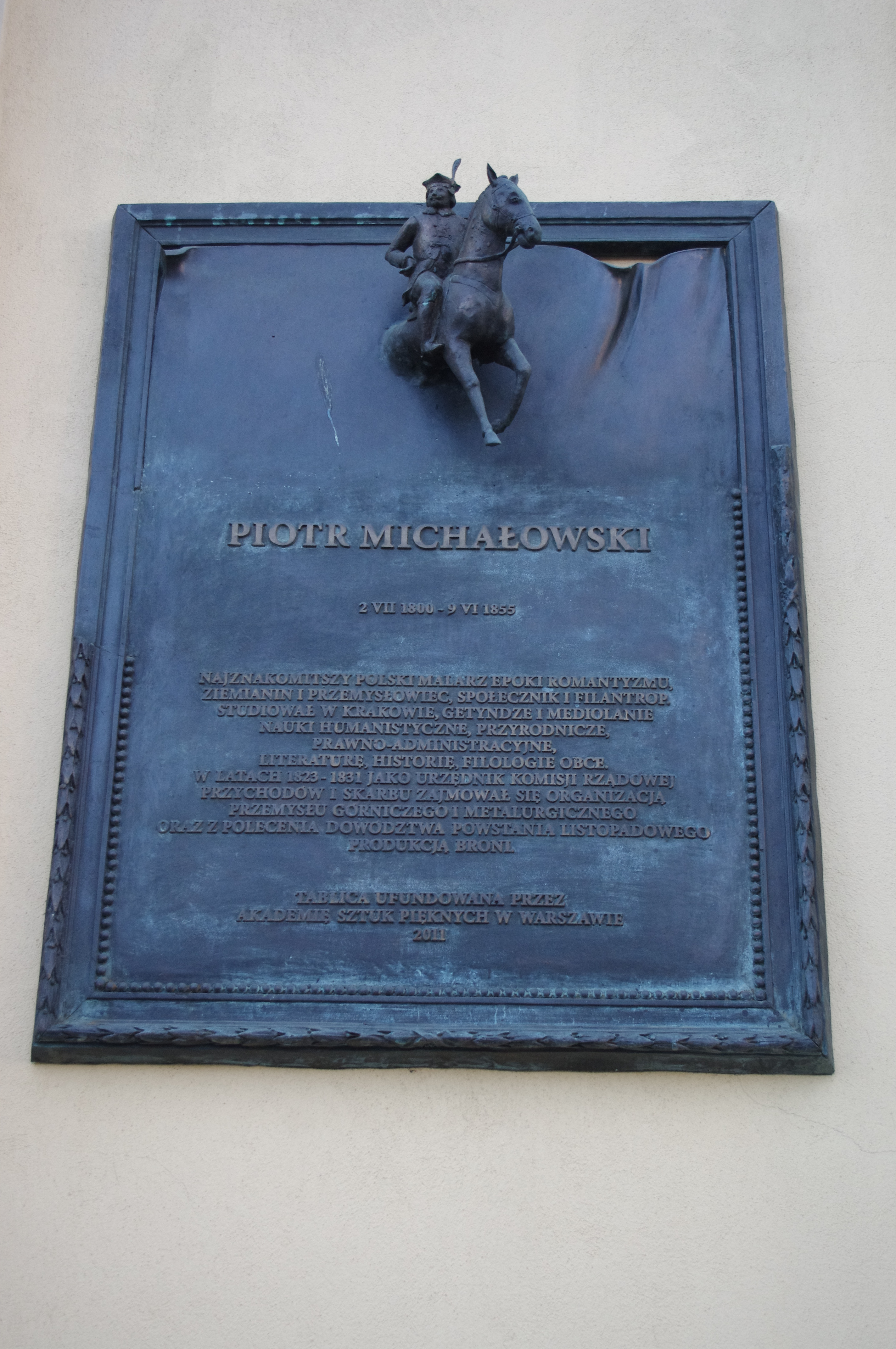 Tablica upamiętniająca Piotra Michałowskiego na Placu Bankowym w Warszawie